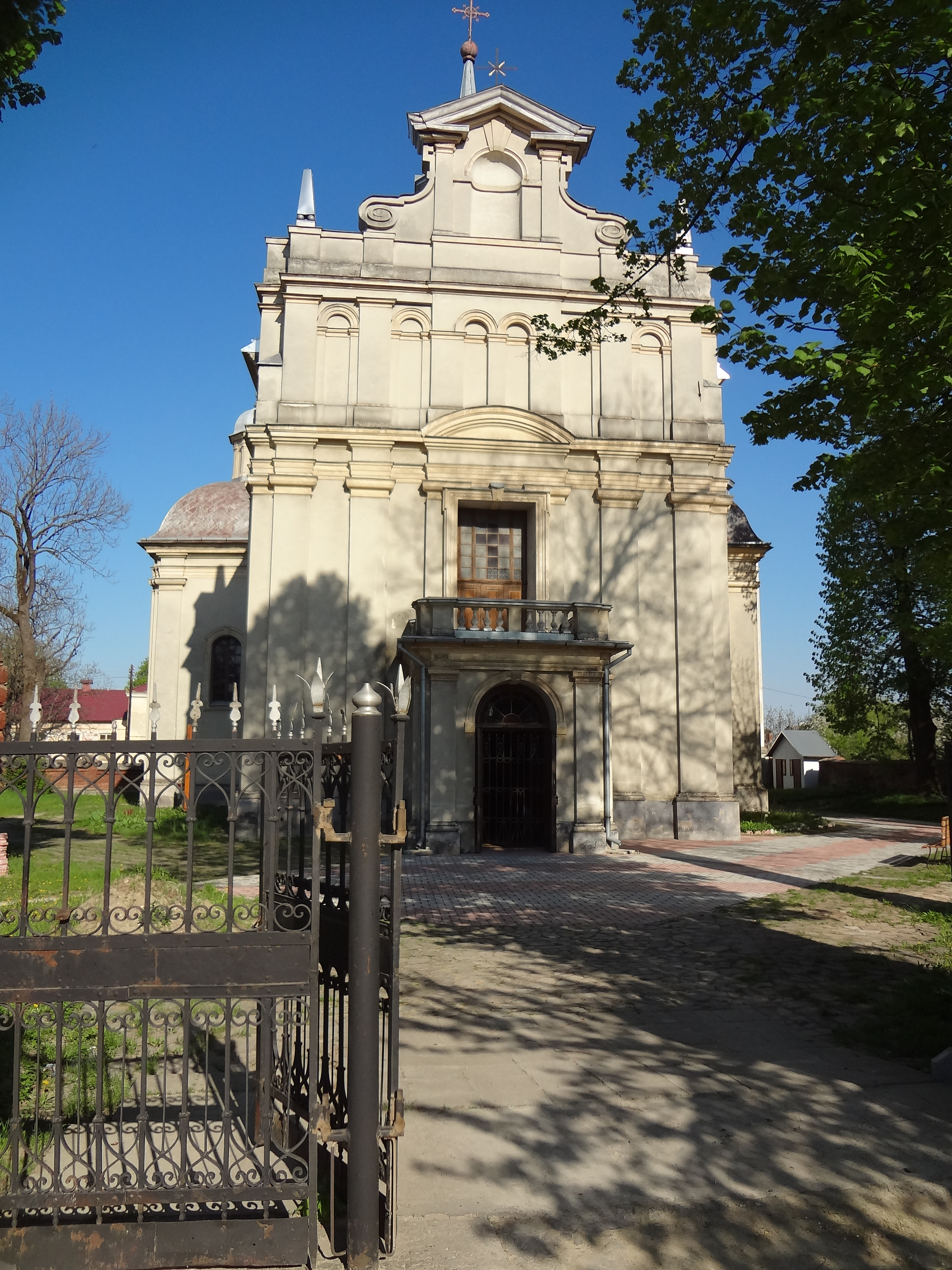 Костел Преображення Господнього(мур.), Добромиль, вул.Грушевського,1